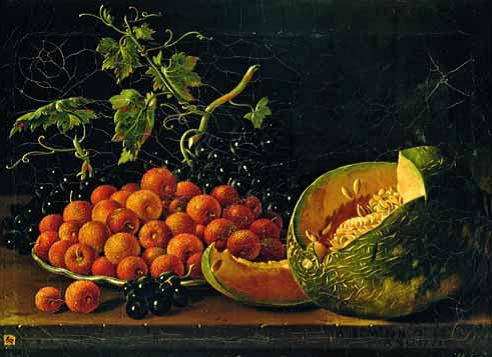 Natura morta de fruites oli sobre tela de Luis Eugenio Meléndez conservada al Palau de los Borbones a El Escorial (Madrid).